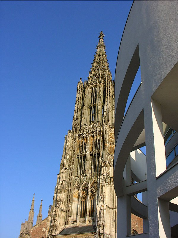 Ulm Kontraste der Architektur am Münsterplatz Stadthaus und der höchste Kirchturm Foto 2007 Wolfgang Pehlemann Wiesbaden PICT3221